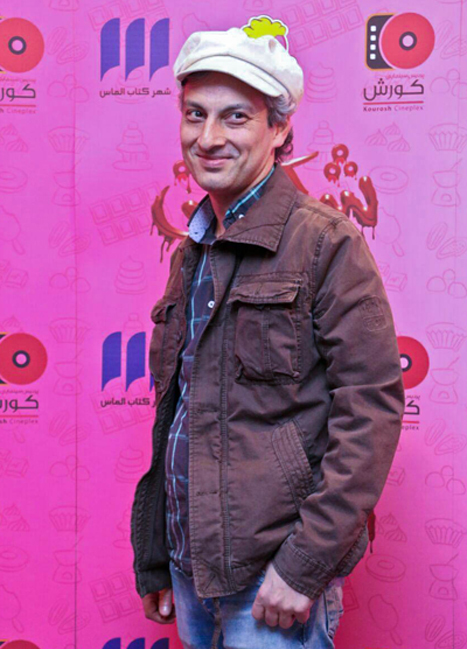 ارژنگ امیرفضلی در اکران خصوصی فیلم شکلاتی